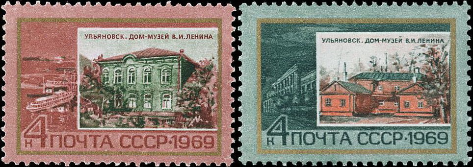 Почтовая марка СССР №3735-3736 ЦФА